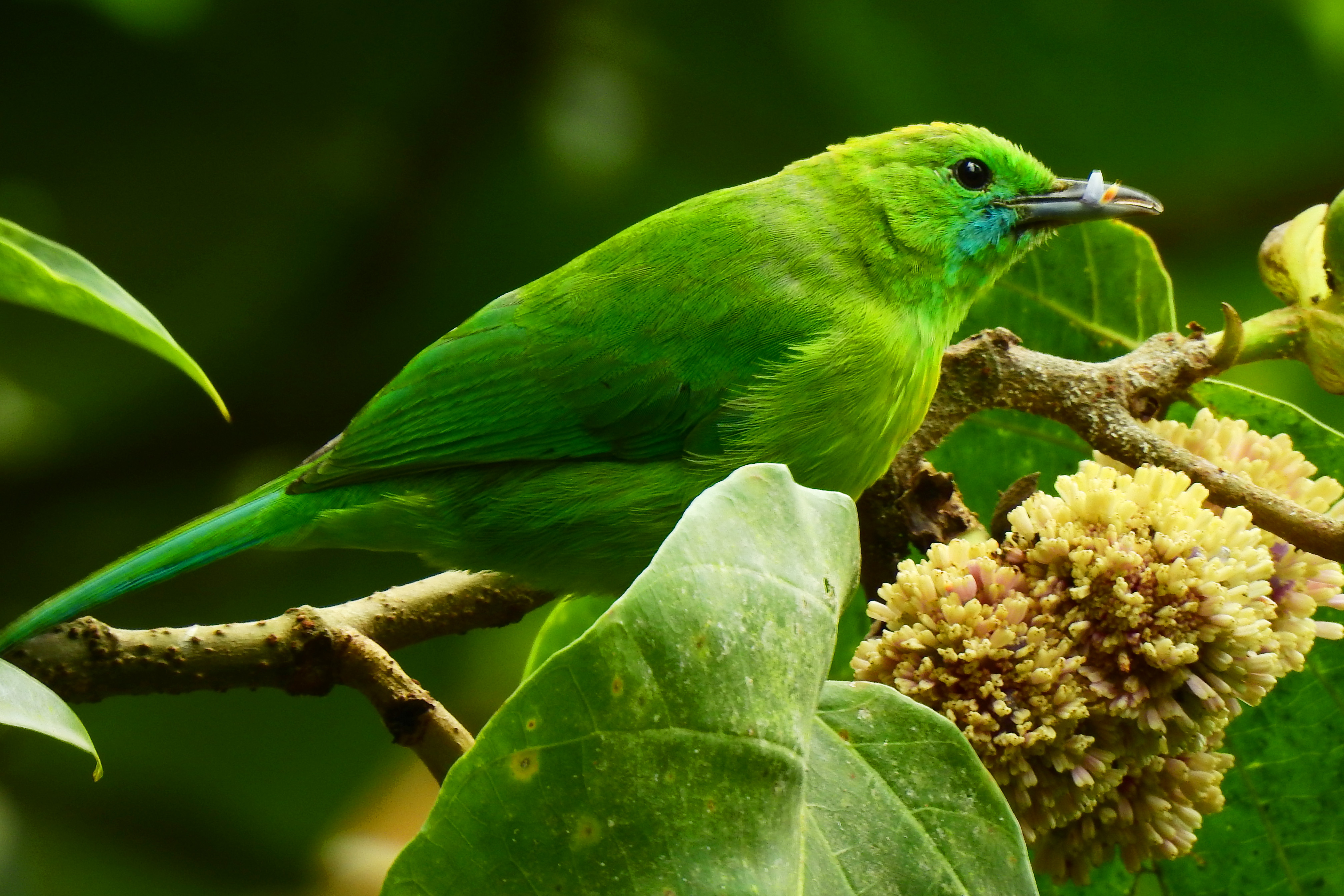 Seekor burung cica-daun sayap biru sedang menikmati buah di kawasan Taman Nasional Gunung Merapi. Burung ini merupakan salah satu jenis yang terancam akibat perdagangan burung yang masif khususnya di kawasan Pulau Jawa.